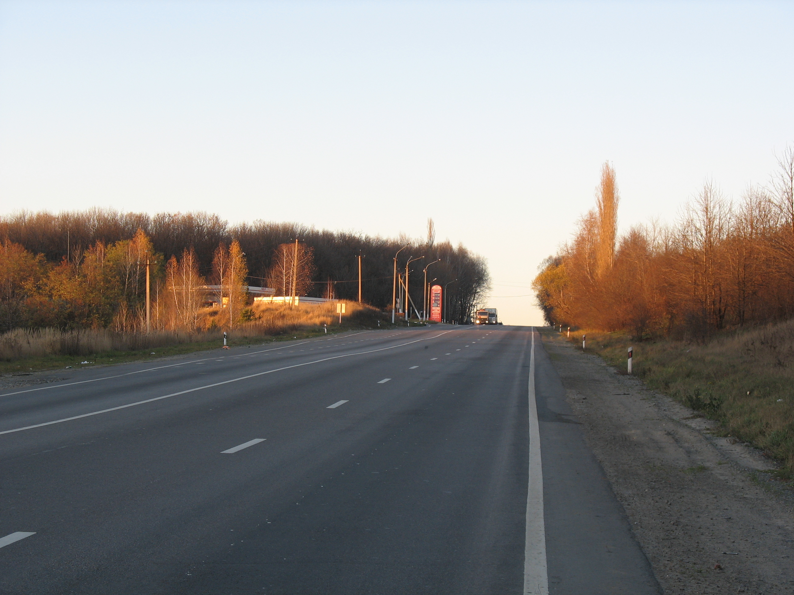 Федеральная дорога М4 недалеко от Чертовицкого (Воронеж)